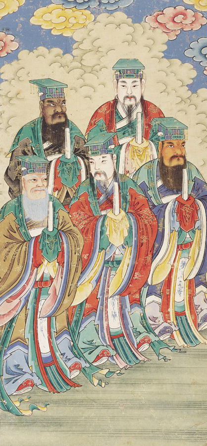 五嶽大帝圖像